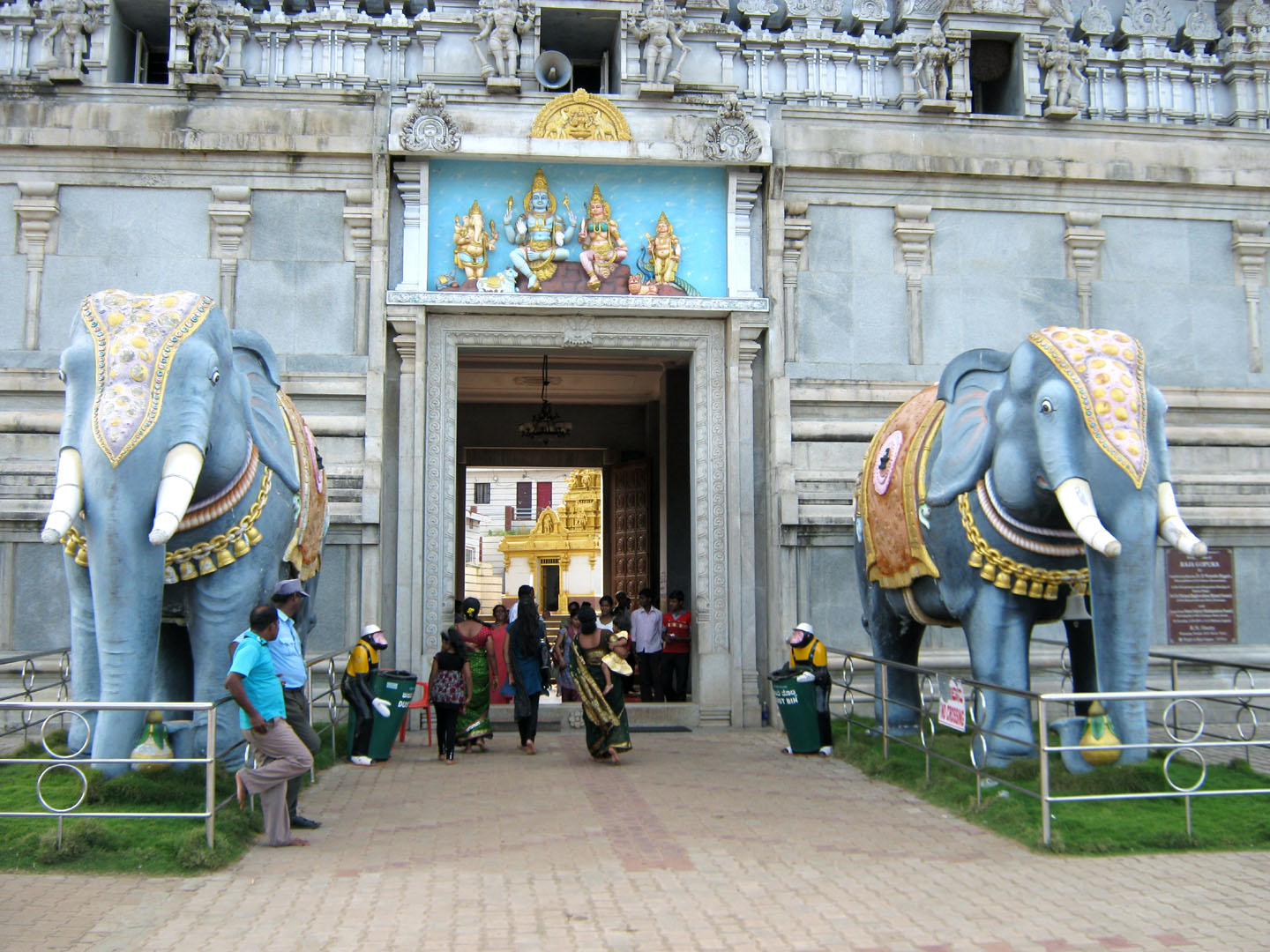 മുരുടേശ്വര ക്ഷേത്രം